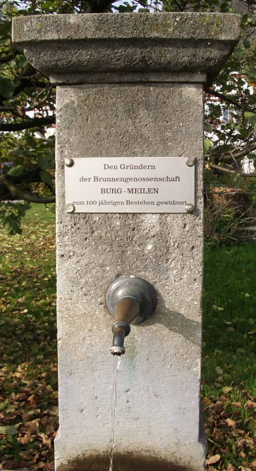 Meilen ZH, German self-made, November 2006